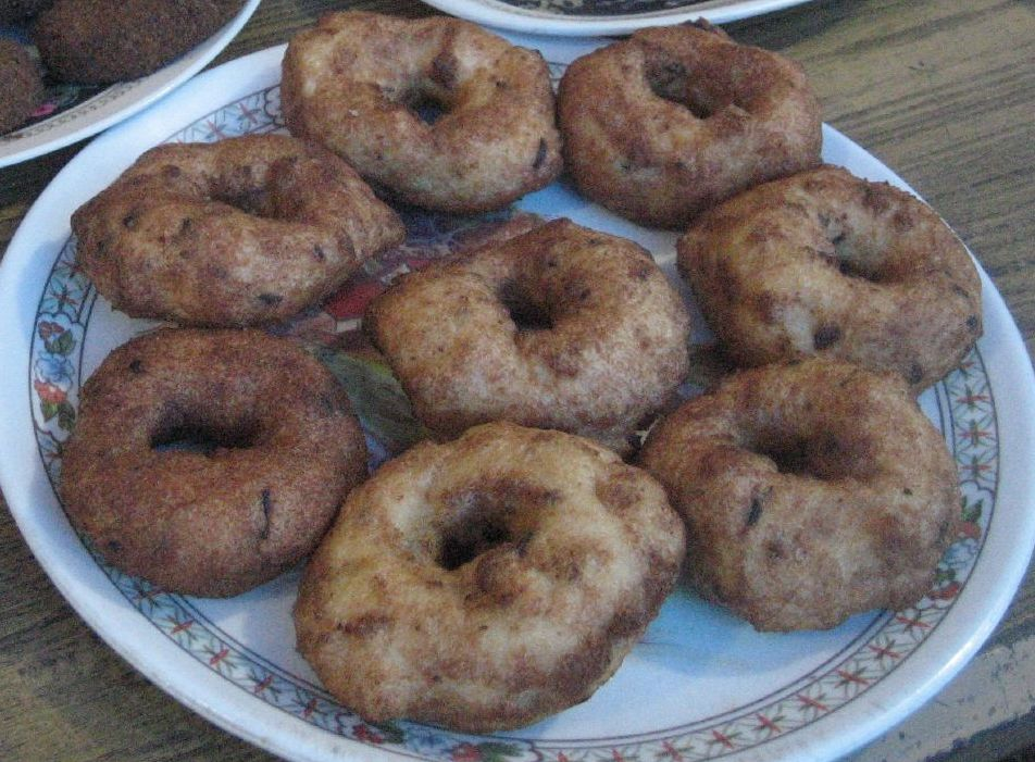 Medu vada